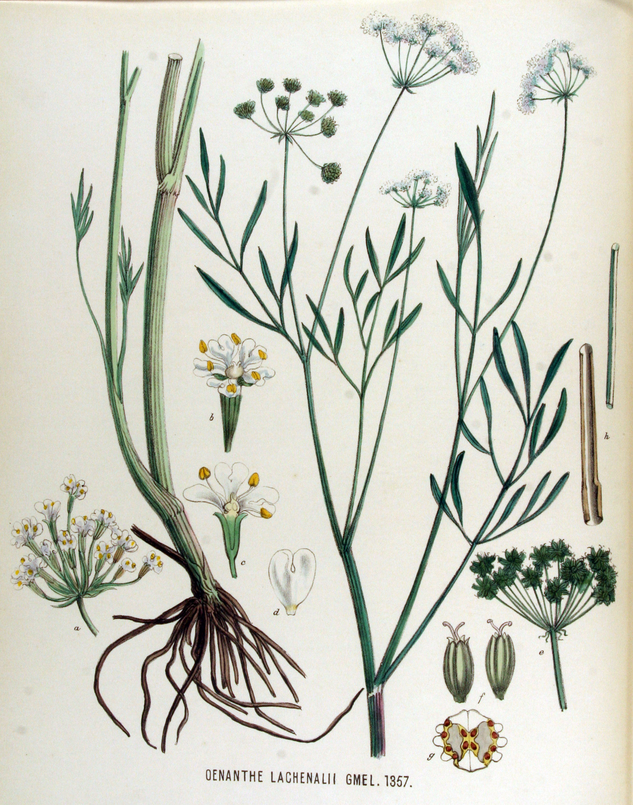 Oenanthe lachenalii C.C. Gmel.